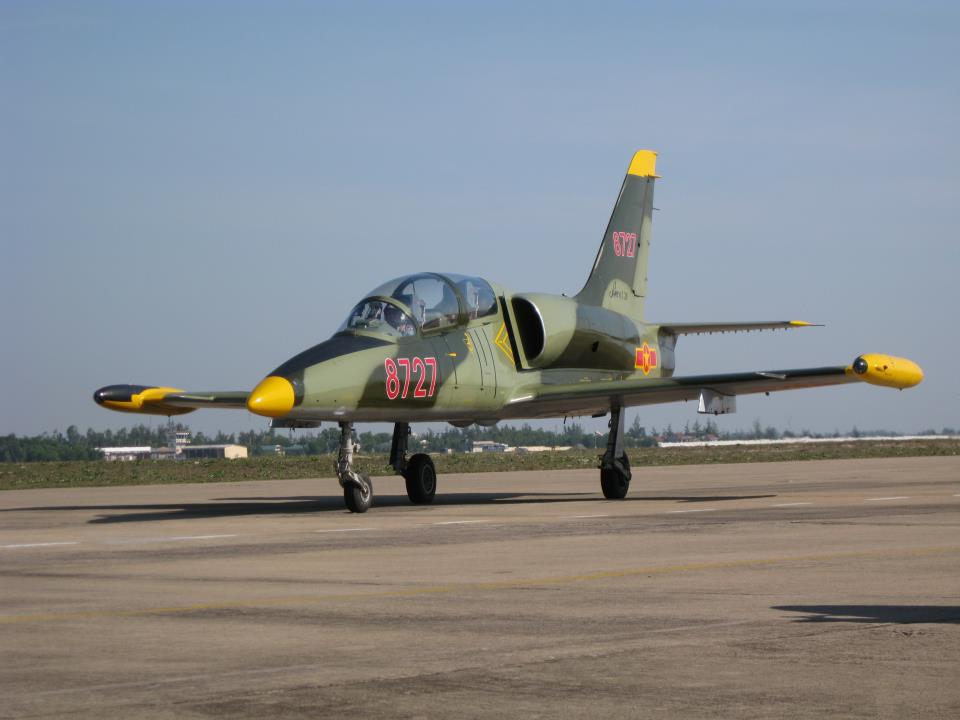 Máy bay huấn luyện L-39